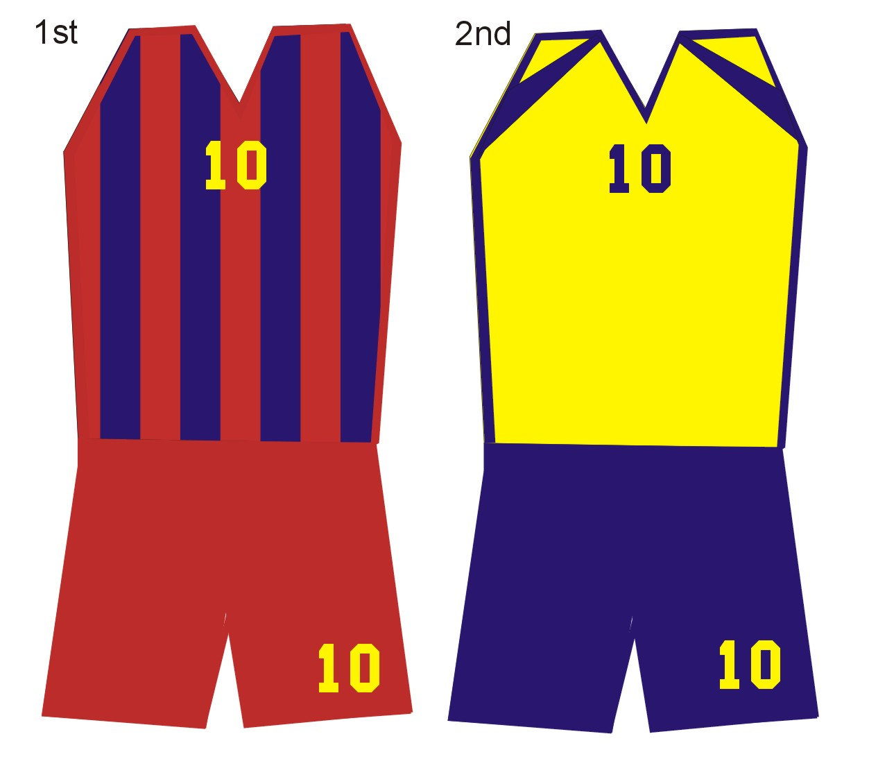 Este no es el actual uniforme